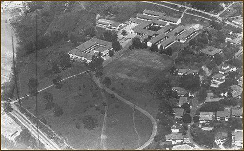 Vista aerea antigua del Instituto Técnico Industrial Pascual Bravo en la ciudad de Medellín.